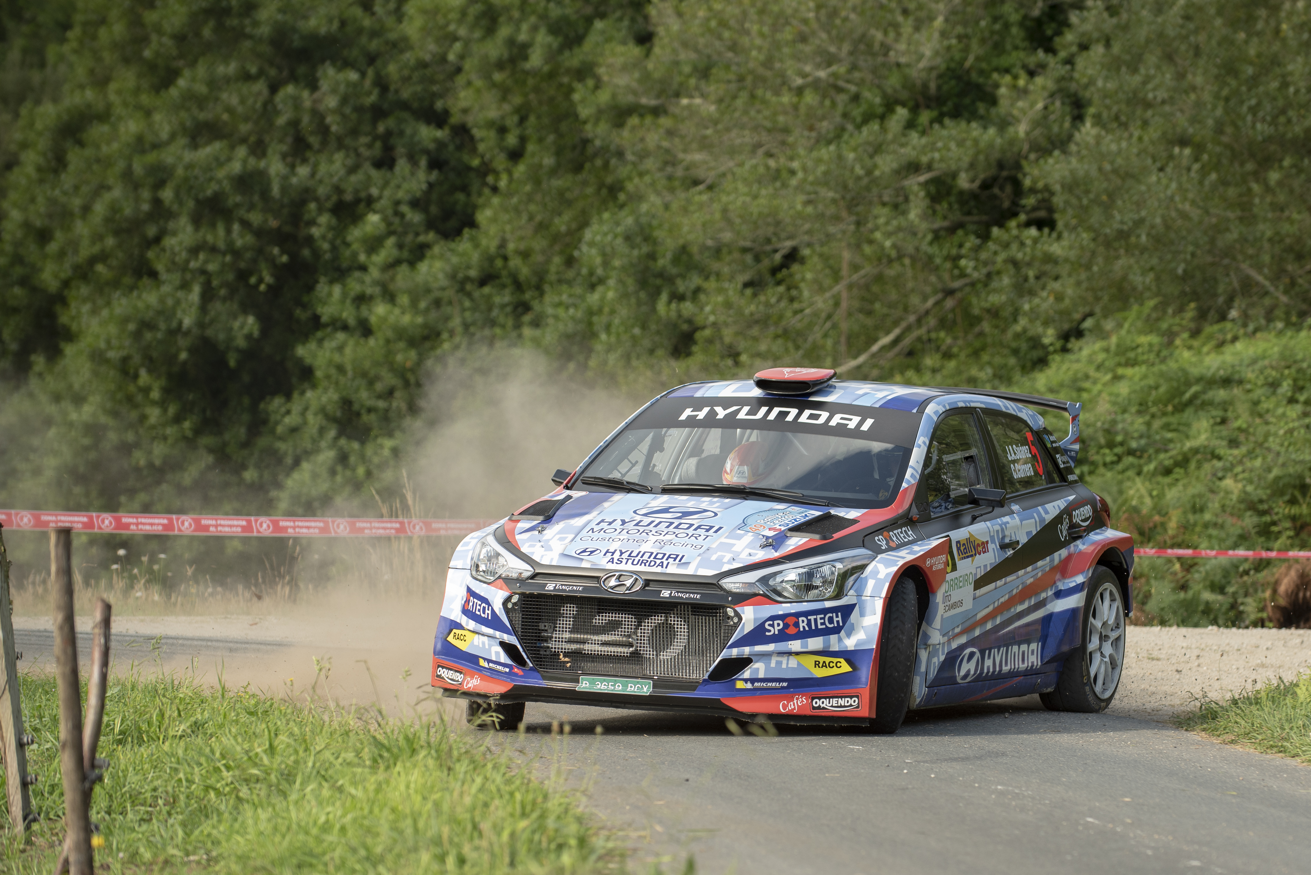 Cohete Suarez segundo clasificado 49 Rally Ferrol 2018